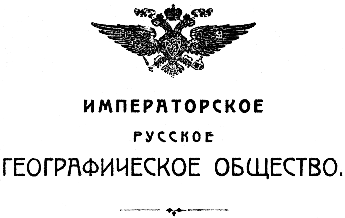 Бланк РГО